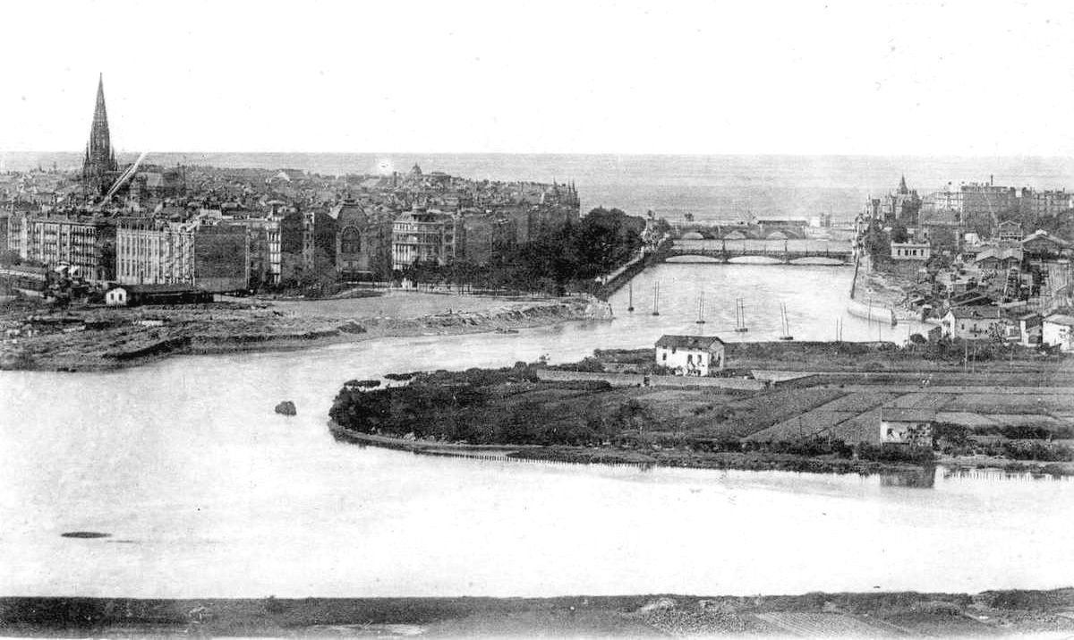 Urumea bideratu aurreko argazki bat da. Ibai eskuinaldean lehenik ikusten diren bi baserriak dira, eskuinean lehendabizi Kolkene edo Presaburu, eta ezkerrean Etxeberri. Errota Txiki atzerago ikusten da, eskuinean, ibaiaren ertzean. Argazkia 1905. urteaz gerokoa da, Maria Kristina zubia eraikita baitago.